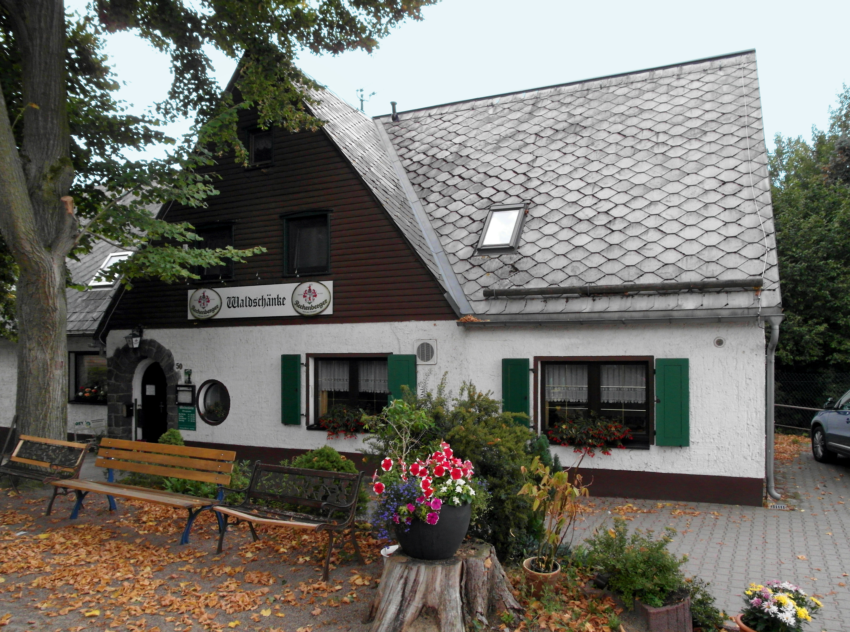 24.08.2018 01774 Obercunnersdorf (Klingenberg), Dorfstraße 50 (GMP: 50.907879,13.540477): Waldschänke Talsperre Klingenberg. [SAM7019.JPG]20180824405DR.JPG(c)Blobelt